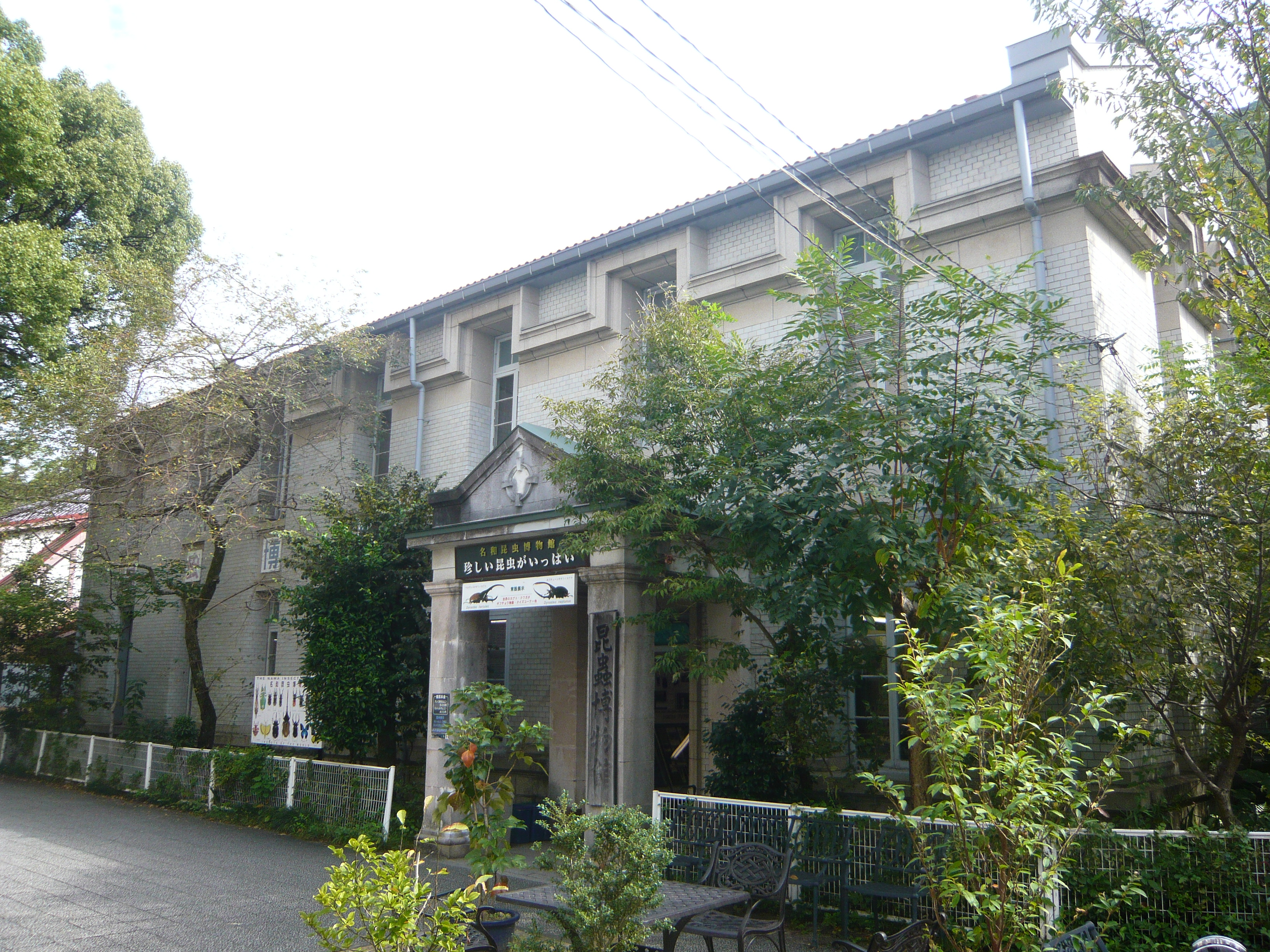 Nawa Insect Museum（名和昆虫博物館）,Gifu,Gifu,Japan（岐阜県岐阜市）で撮影。